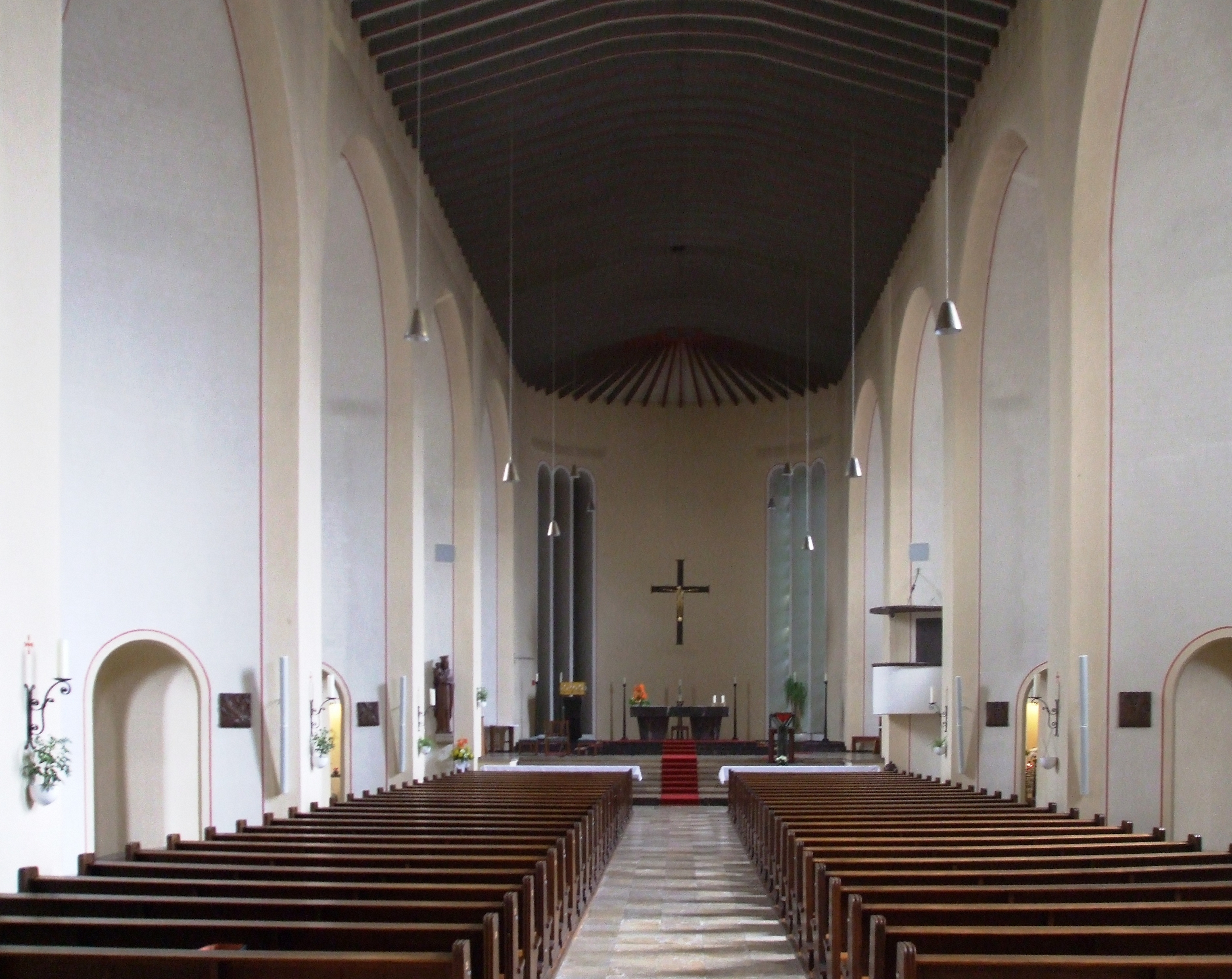 St. Antonius Münster - Blick ins Kirchenschiff